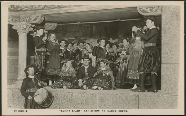 Tarjeta postal. Exposición londinense de Earl´s Court con personajes maragatos.